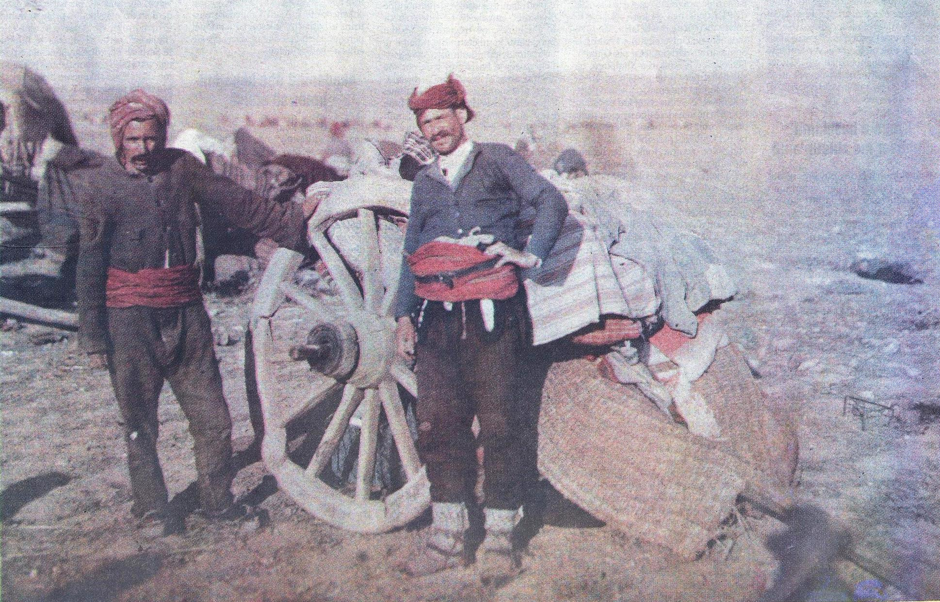 Te debuarit shqiptar ne rrugë pë Turqi